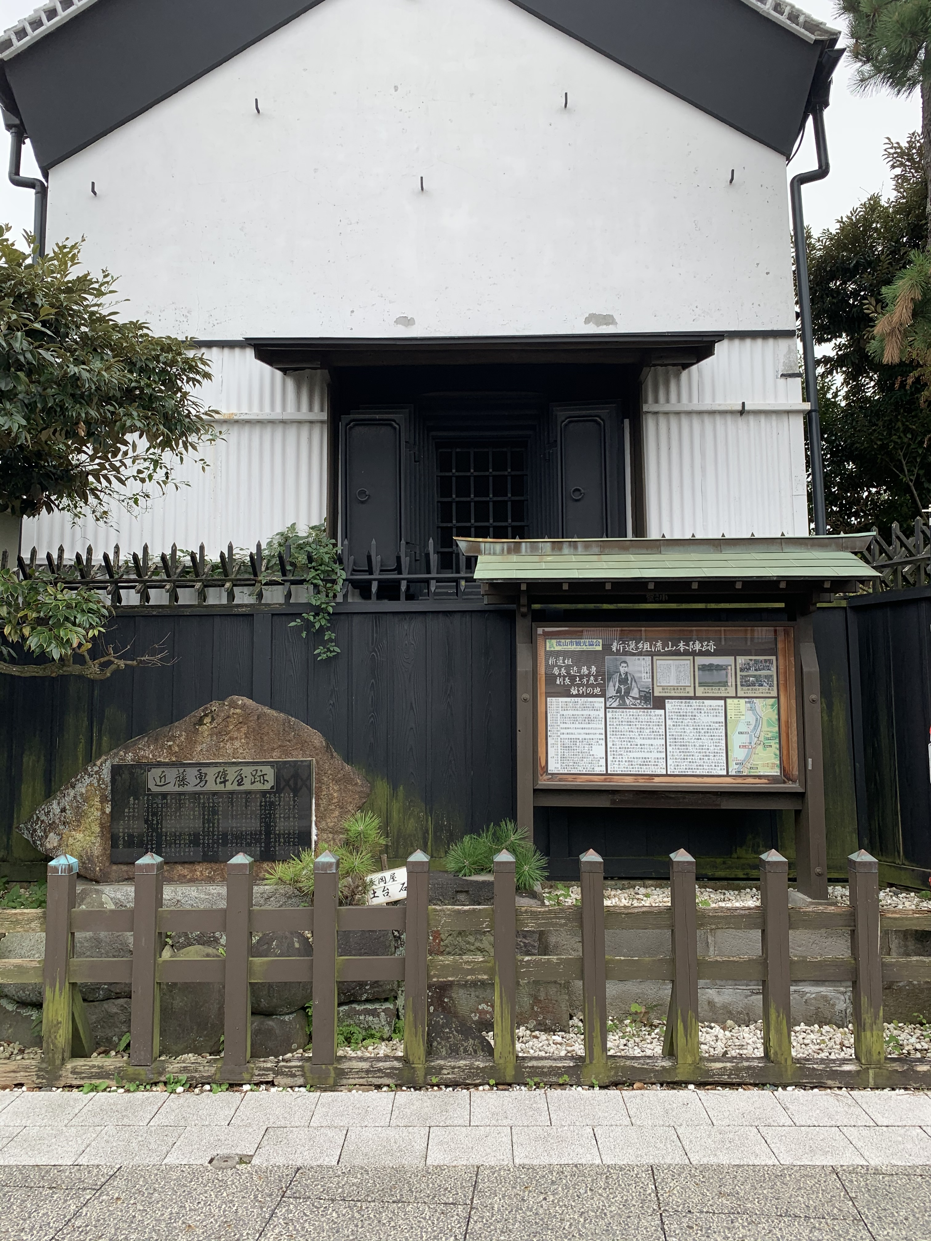 千葉県流山市にある近藤勇陣屋跡の写真です。